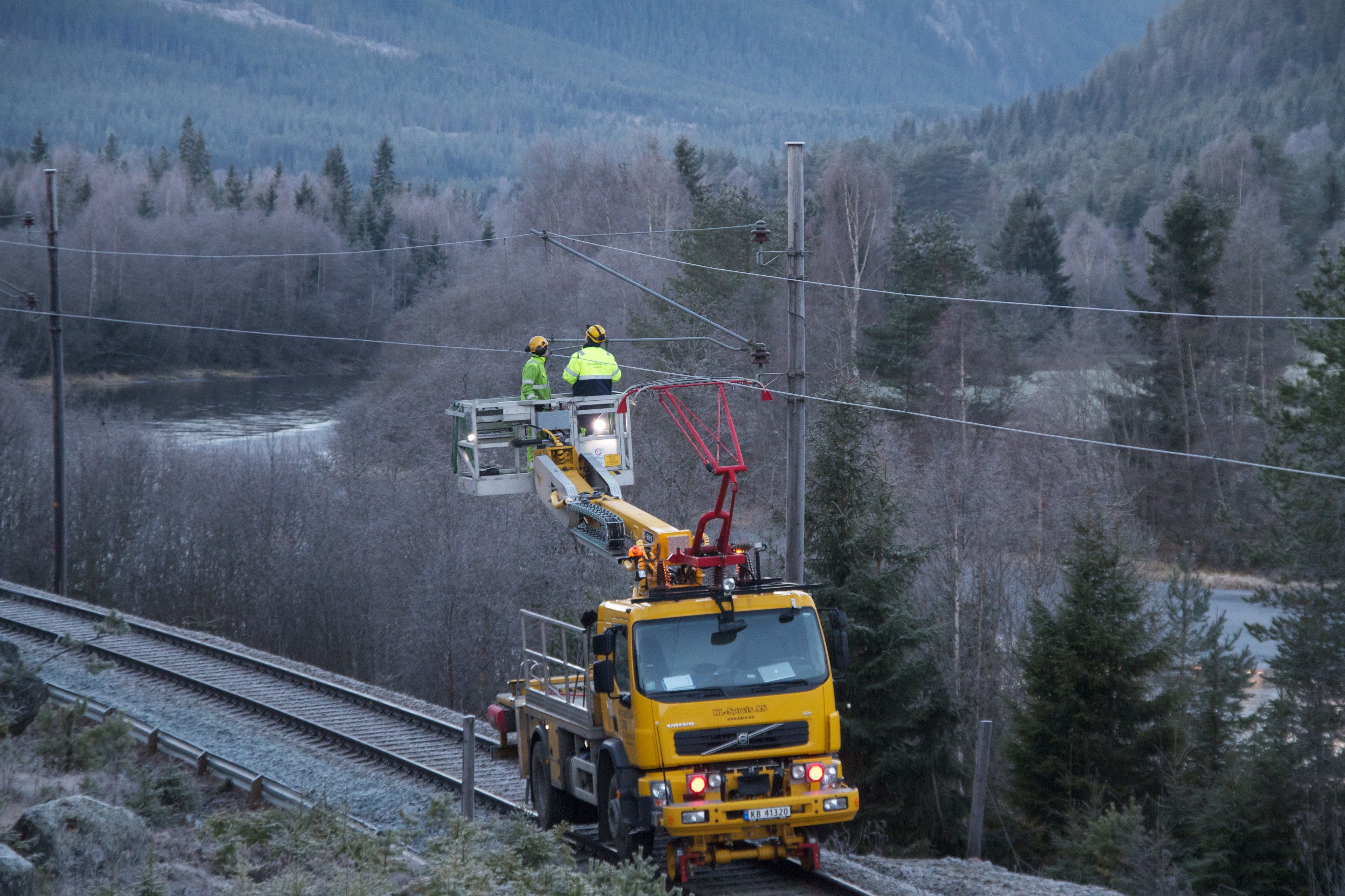 En stormobil i arbeid på Bergensbanen mellom Gol og Ål. Pantografen på taket av førerhytta brukes til å måle inn ledningen. Stormobilen på bildet tilhører Nettpartner Bane AS.